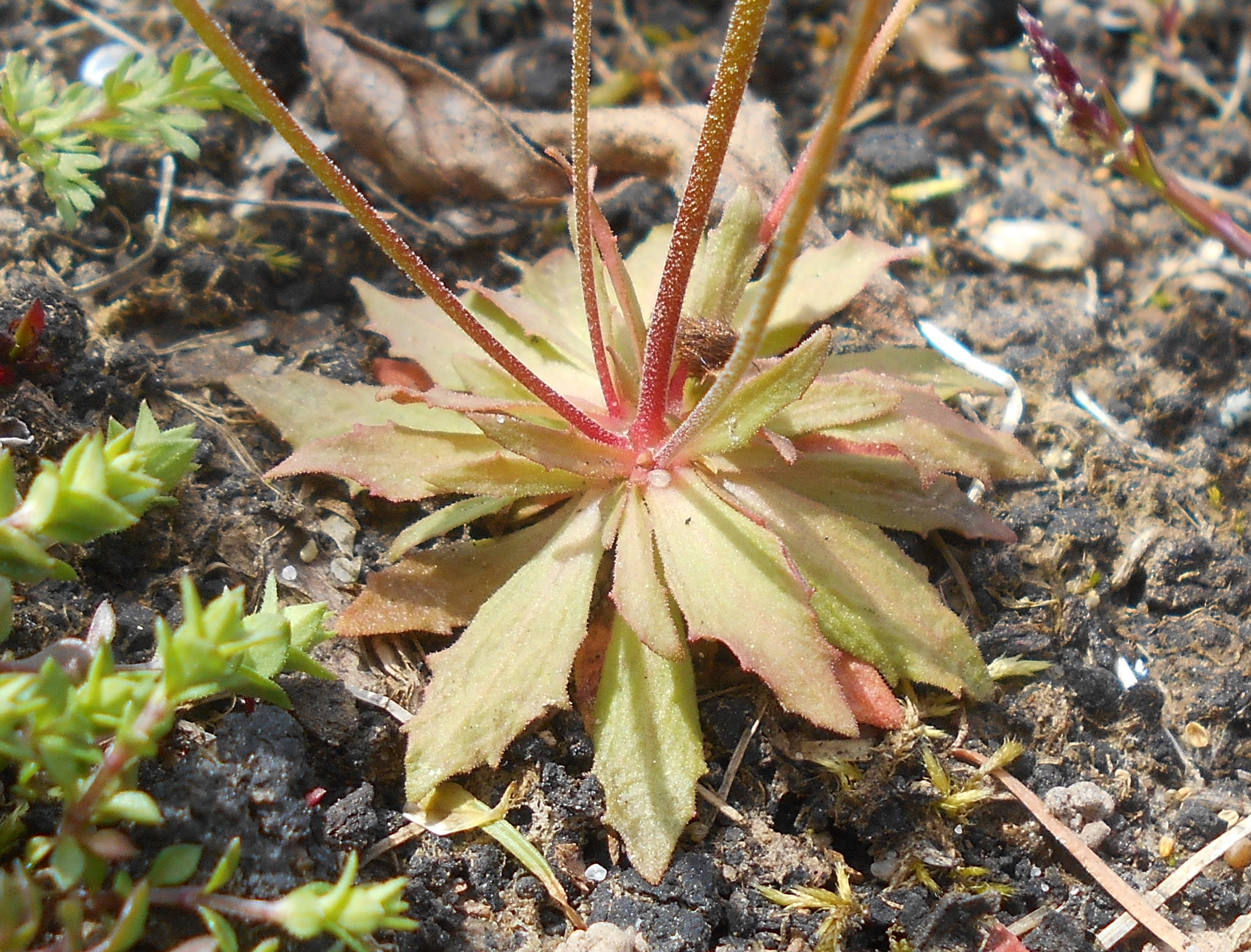 Naradka północna (Androsace septentrionalis), Ogród Botaniczny UMCS w Lublinie.